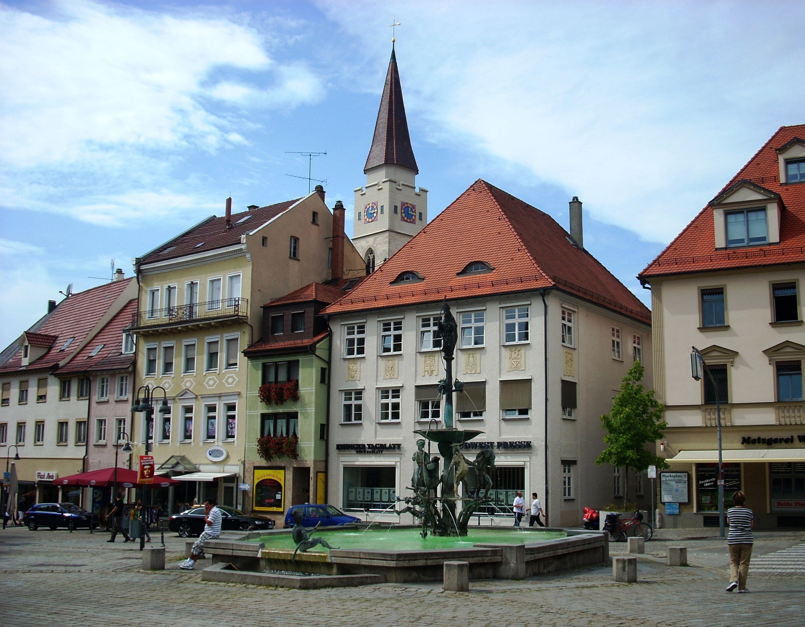 Ehingen/Donau,St.Blasius und Theodulbrunnen